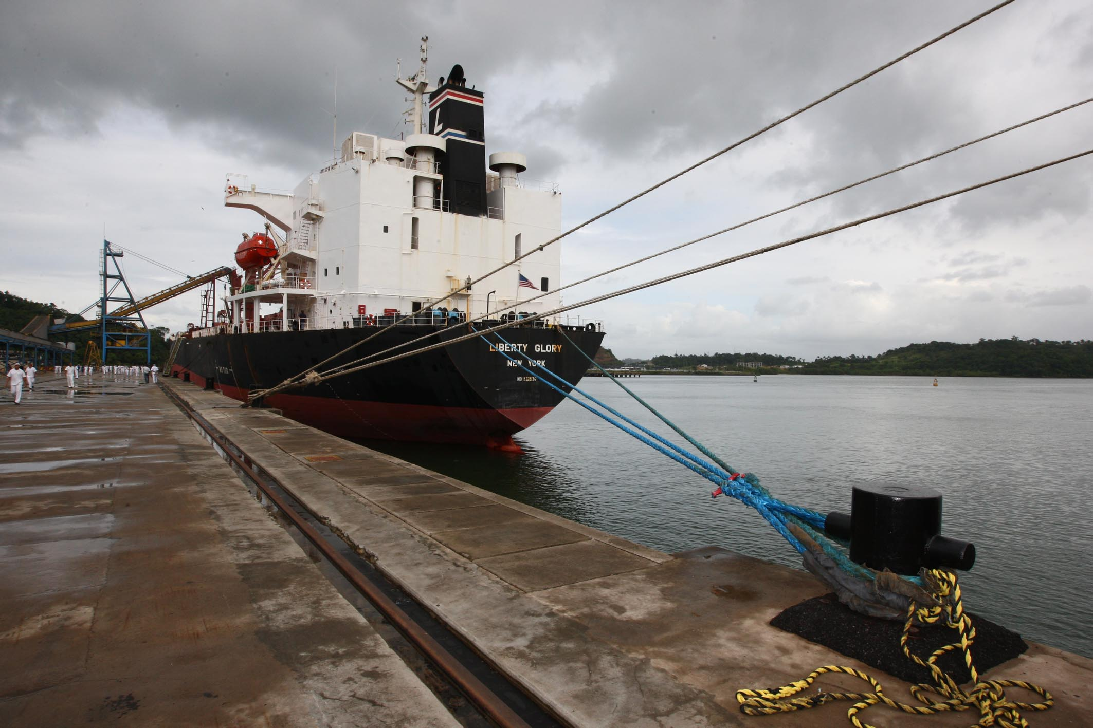 Governador Jaques Wagner e o ministro Pedro Brito participam da inauguração do Terminal Portuário de Cotegipe em São Tome de Paripe em Salvador. Na foto: Foto Manu Dias/AGECOM